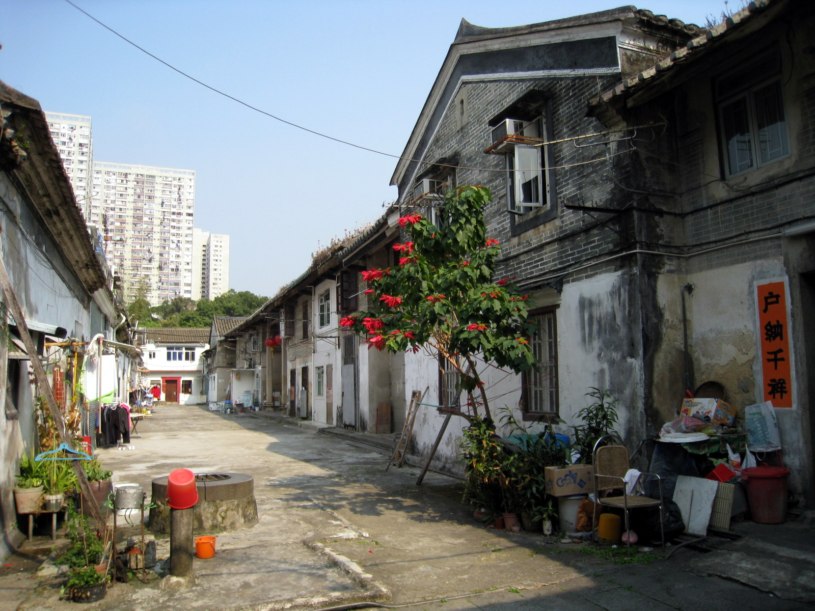 HK Tsang Tai Uk In Sha Tin